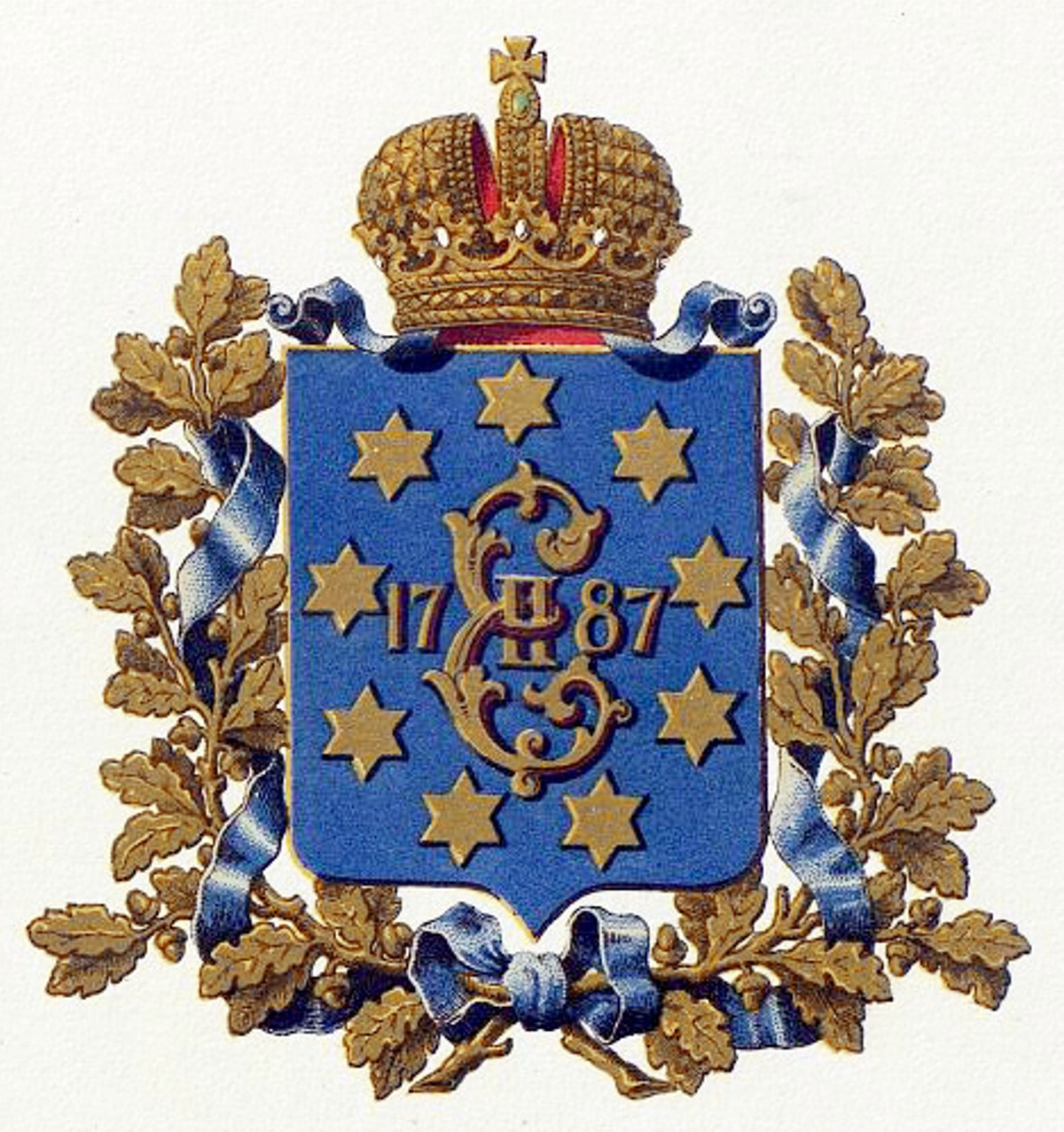 Official Russian Empire coat of arms Ekaterinoslav Governorate. Гласный герб Российской Империи Екатеринославской губернии в Гербовнике МВД. Утверждён Императором Всероссийским Александром Вторым в 1878 году.